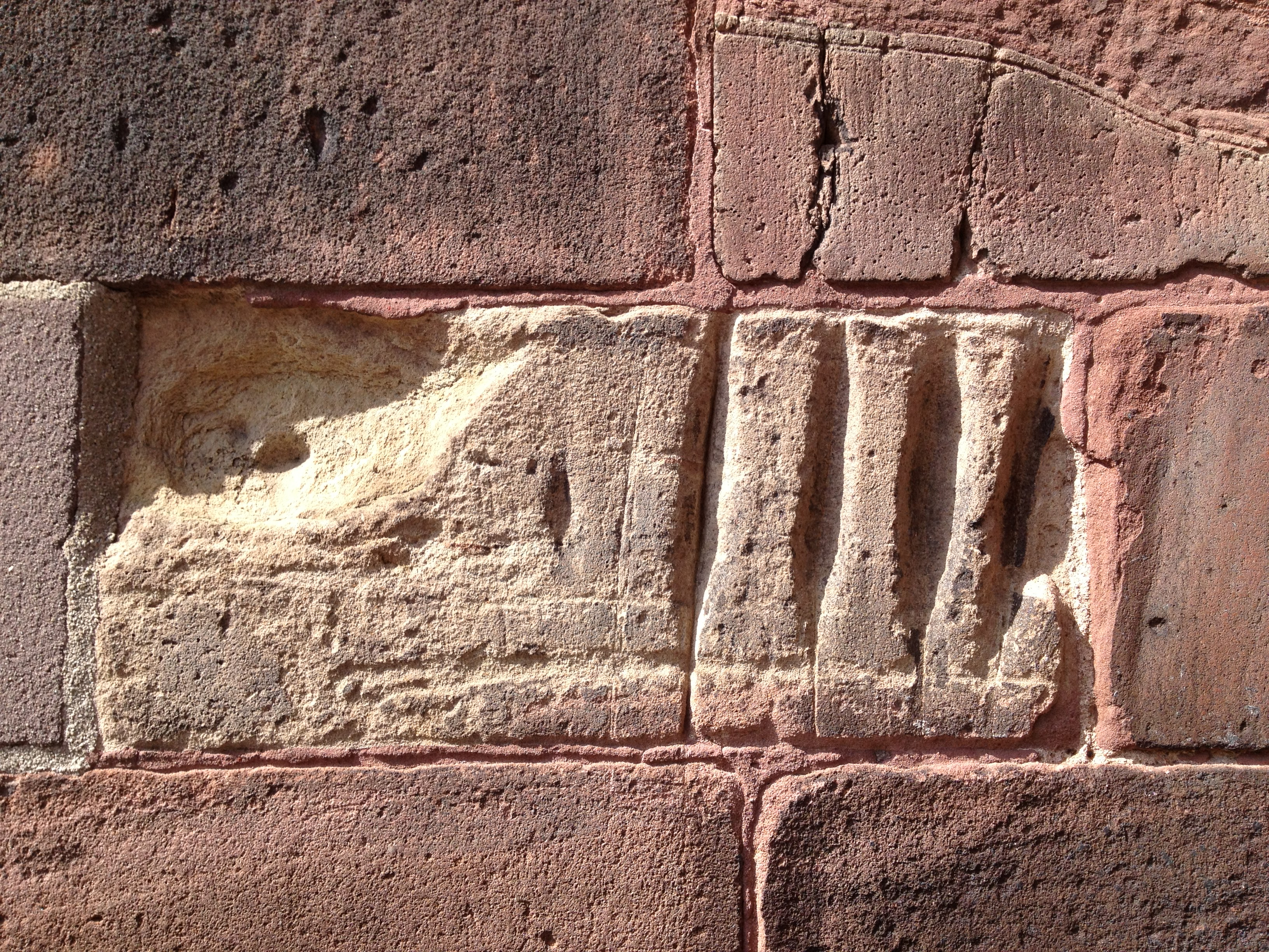 Wetzrille am Freiburger Münster - Haupteingang Nordseite